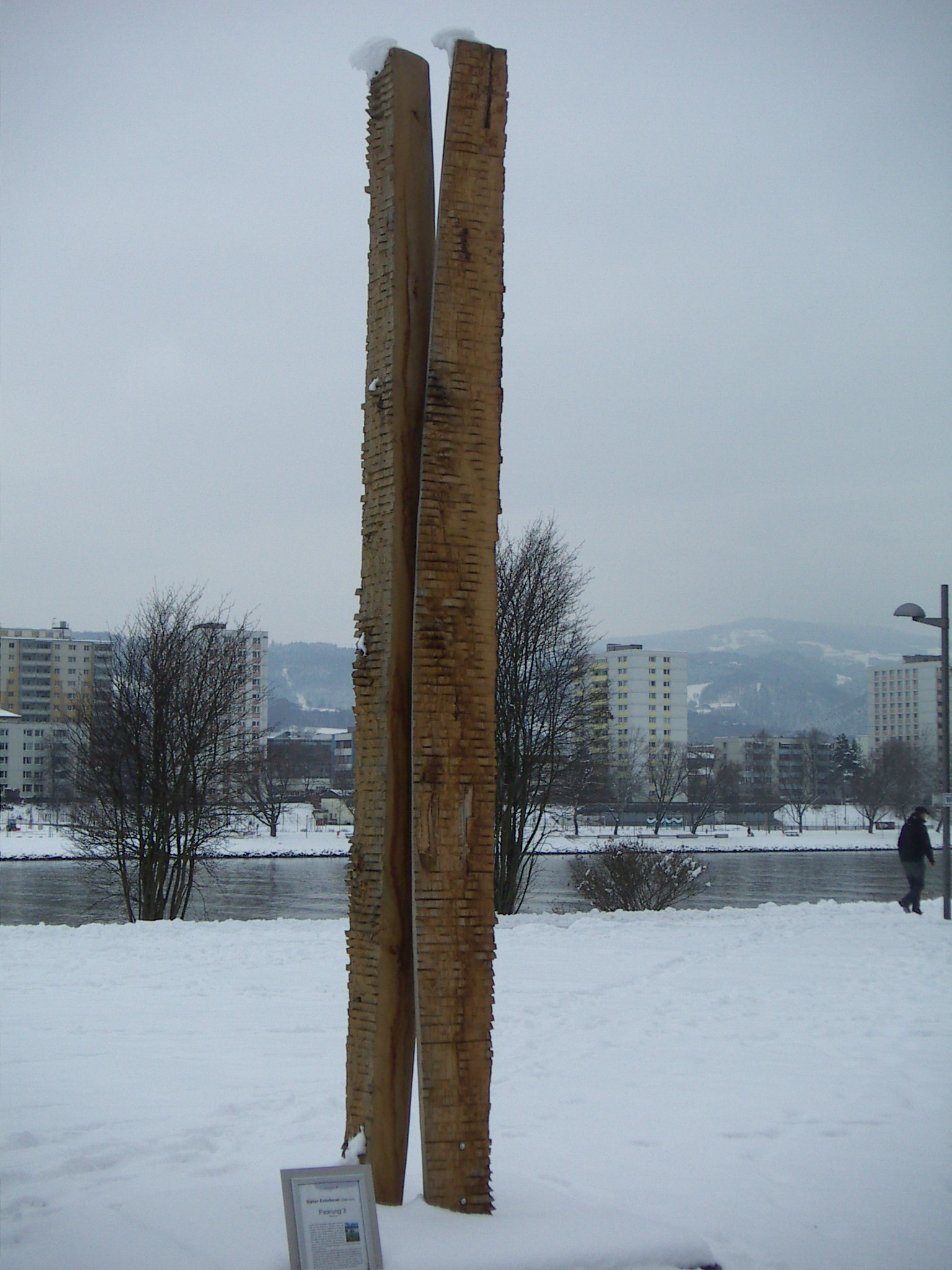 Stefan Esterbauer, Skulptur Paarung beim Brucknerhaus